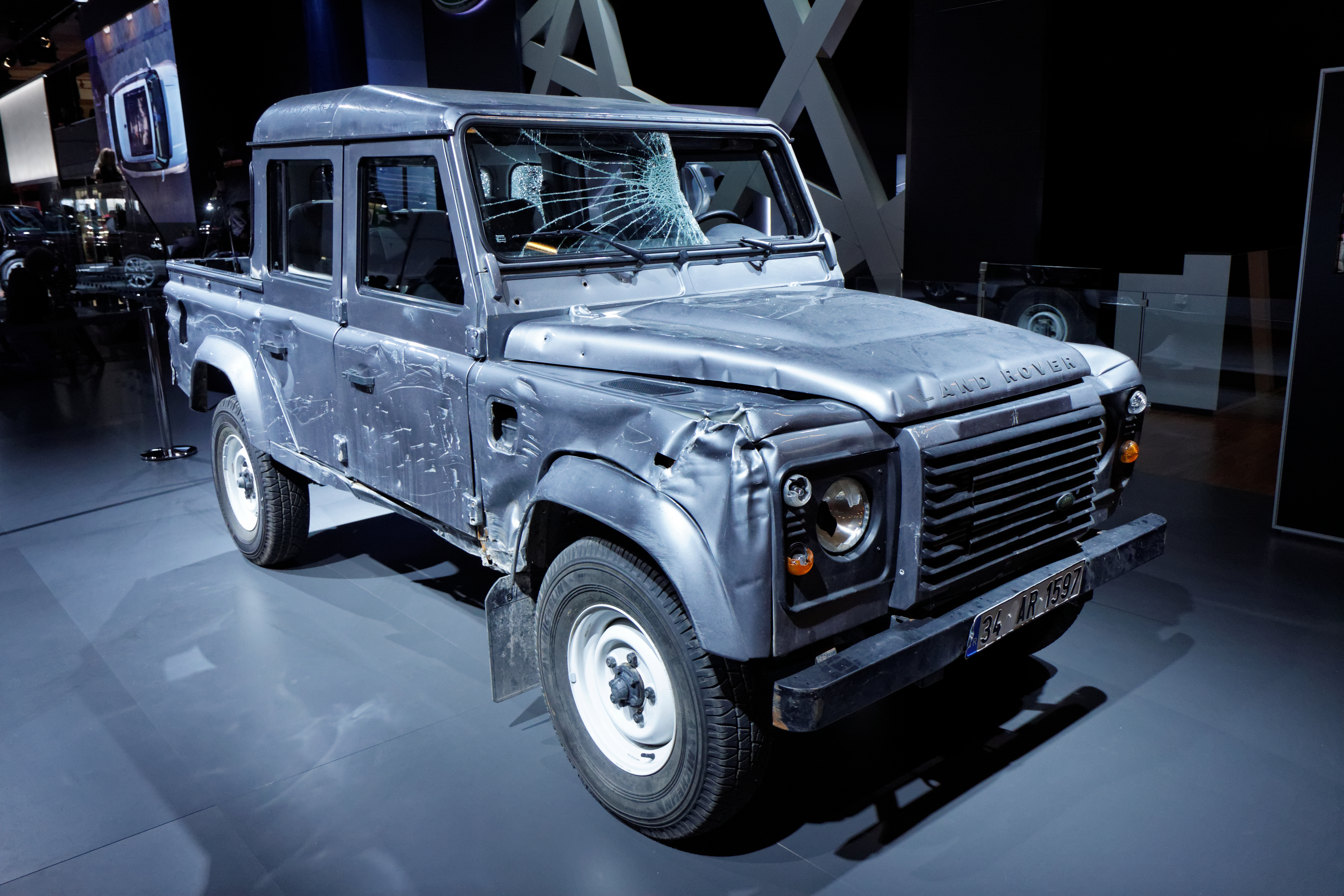 Une Land Rover Defender Double Cab pick-up présentée lors du Mondial de l'automobile de Paris 2012.